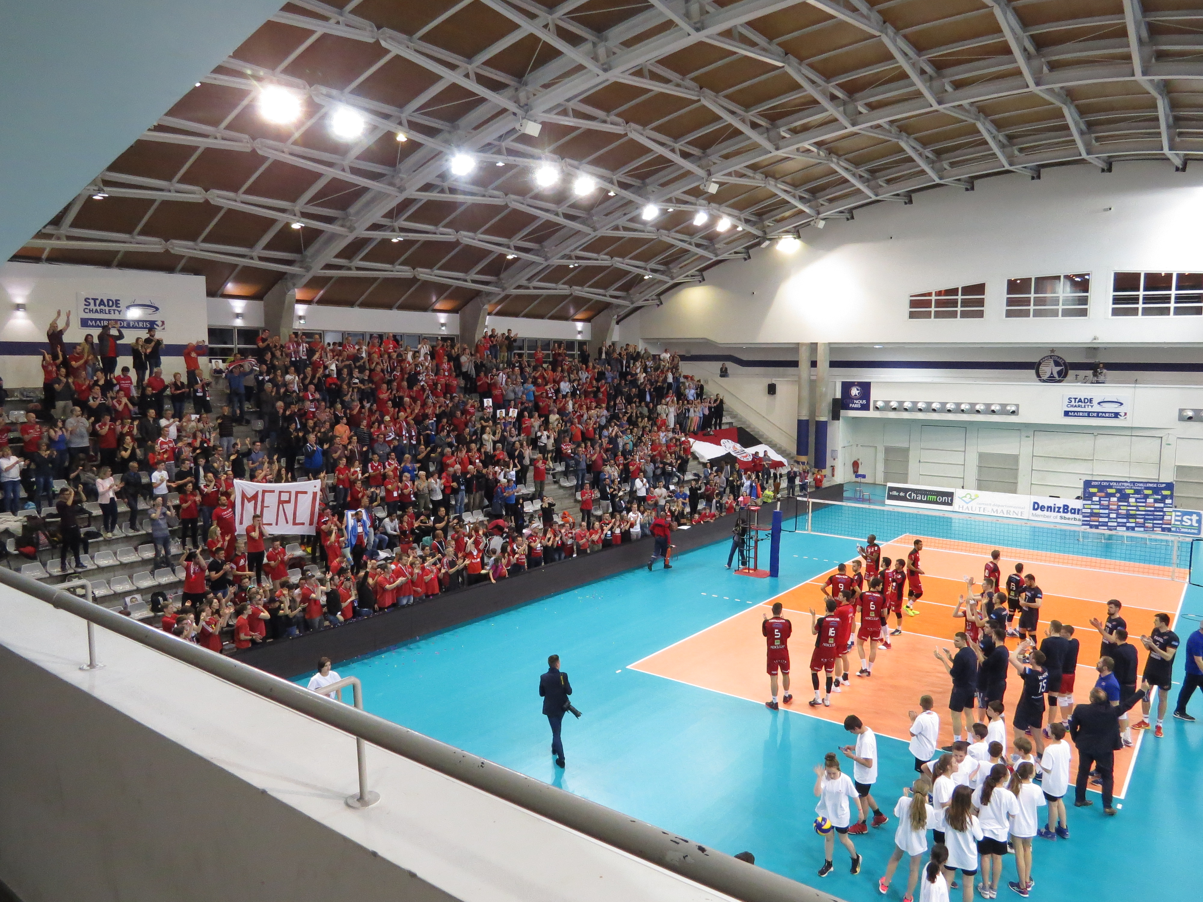 Photos réalisées lors de la finale aller de la Challenge Cup entre le Chaumont Volley-Ball 52 et le Fakel Novy Ourengoï à Paris (salle Charpy)